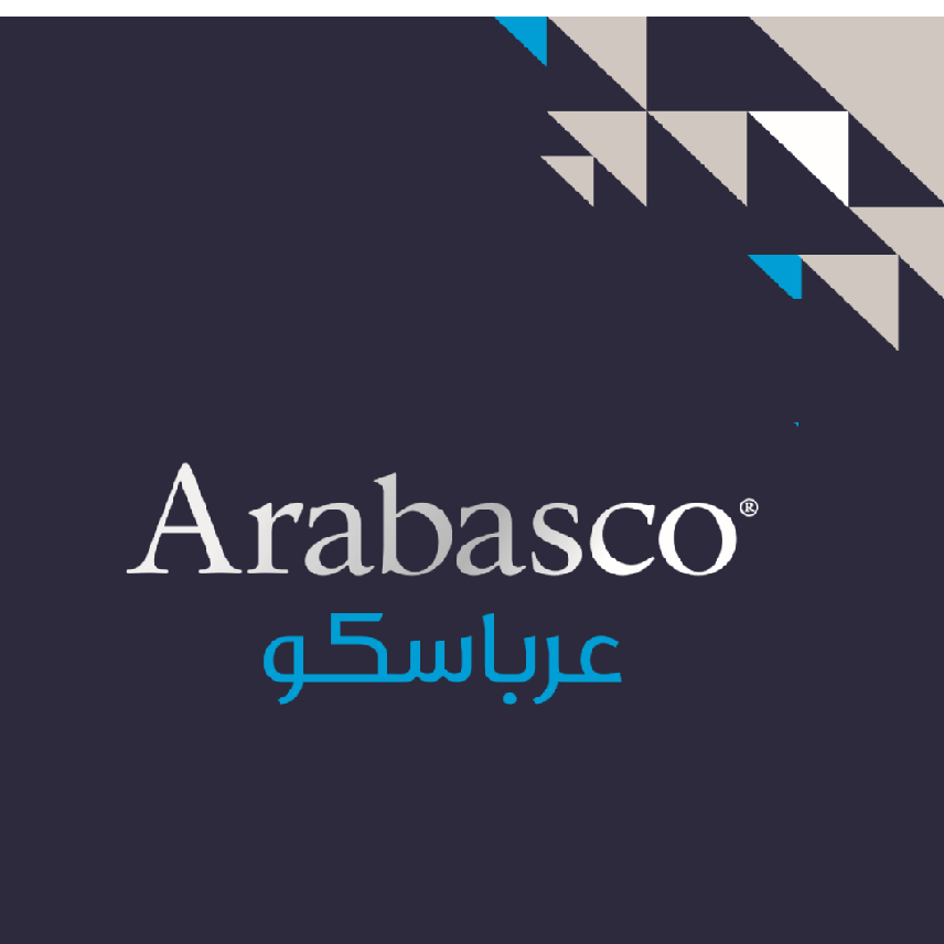 الشركة العربية لخدمات الطيران المحدودة